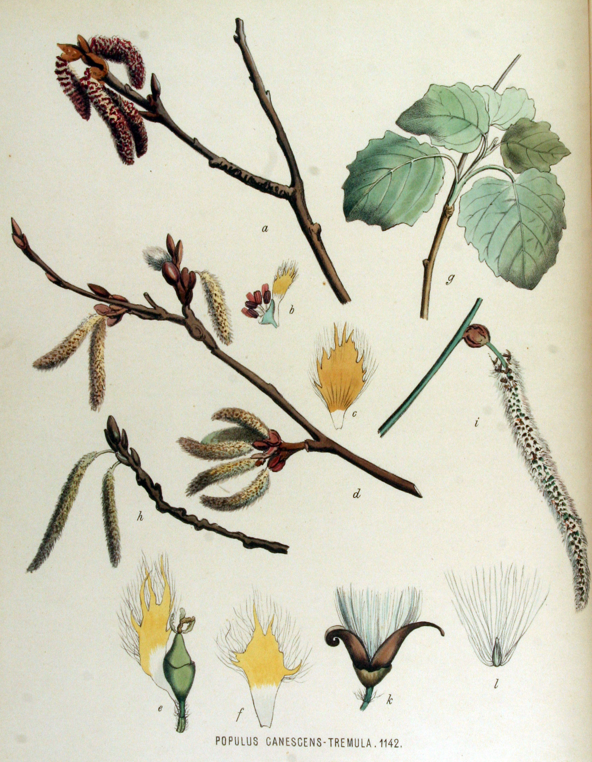 Populus ×canescens × tremula